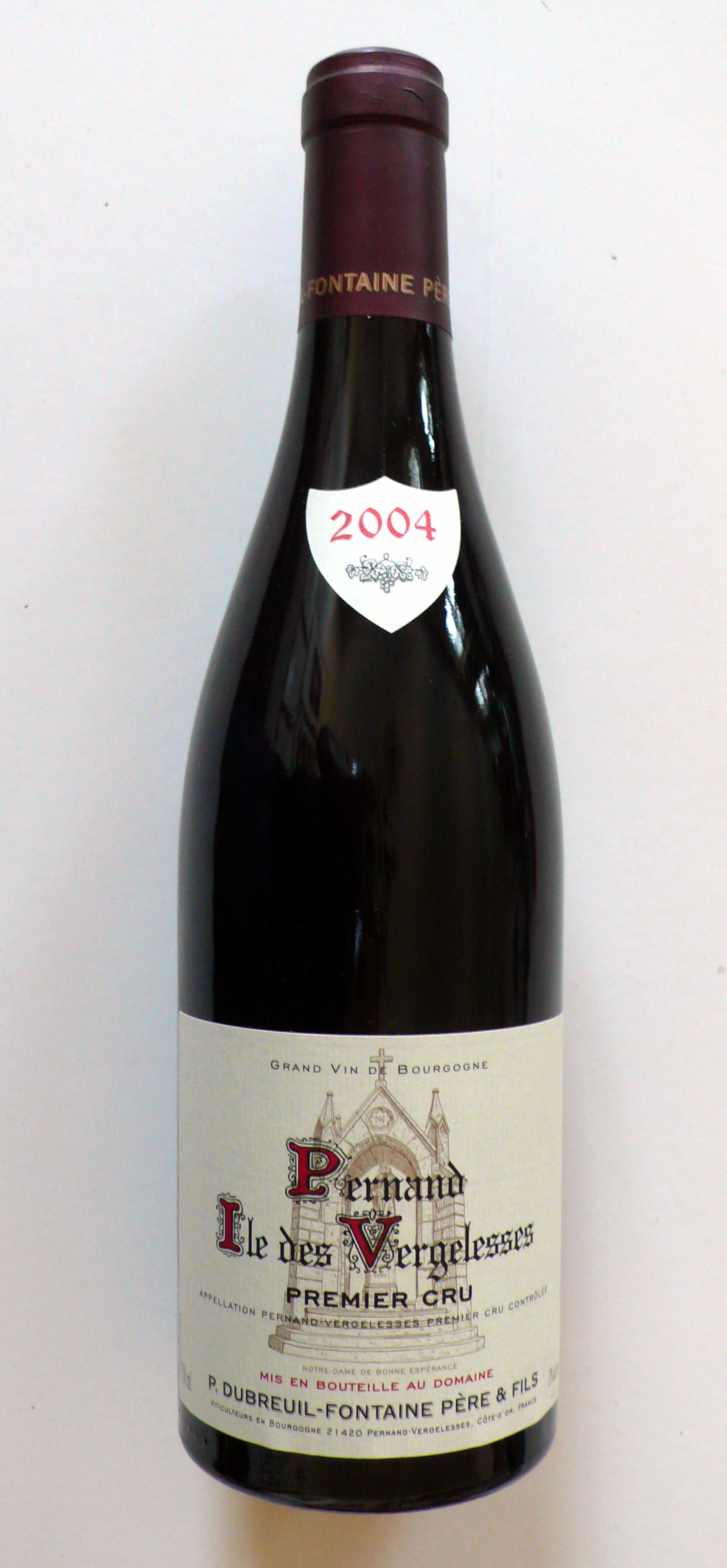 Pernand-Vergelesses, Côte-d'Or, Burgund; Premier Cru, Île des Vergelesses